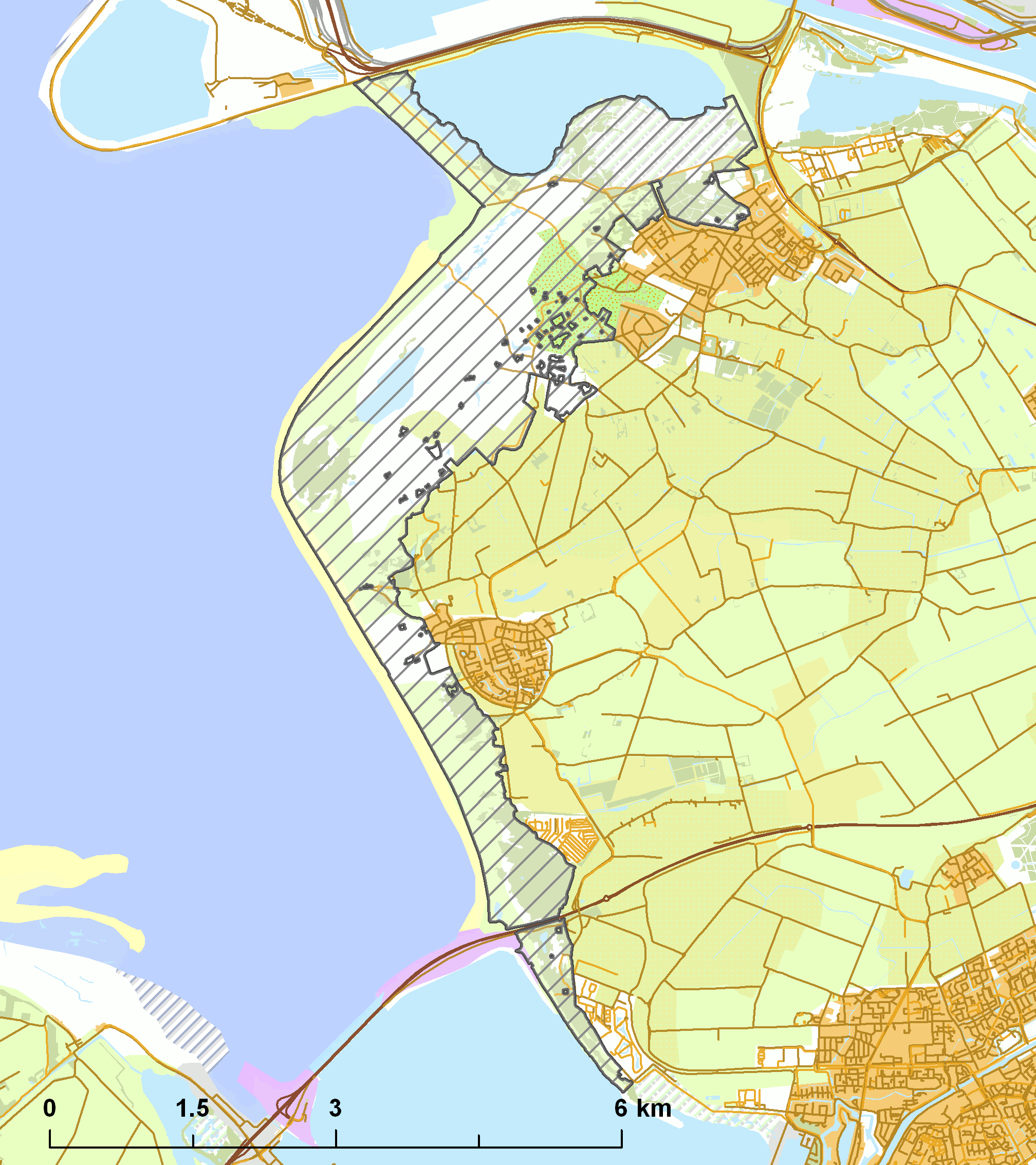 Natura2000 - Voornes Duin.png